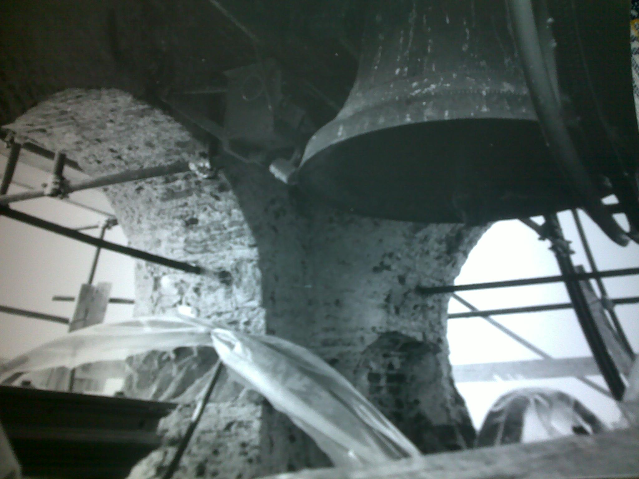 L'interno della cella campanaria del campanile di Cornaredo (MI), dopo la sostituzione del campanone nel 1957